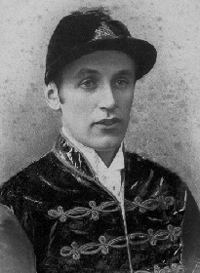 fotografía de Archer en algún momento de su exitosa carrera, entre 1874 y 1886